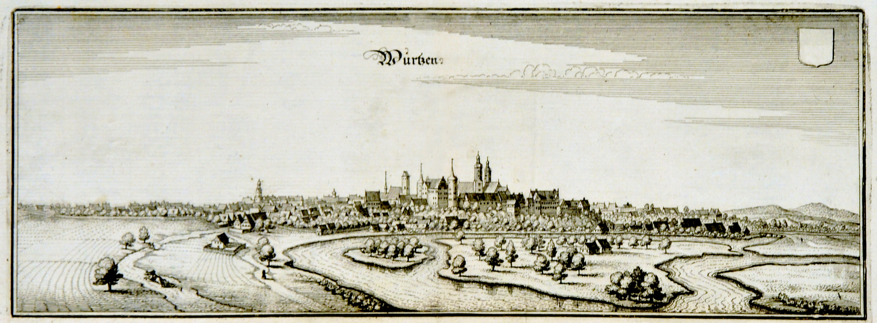 Wurzen. Kupferstich von Merian d. Ä. um 1650